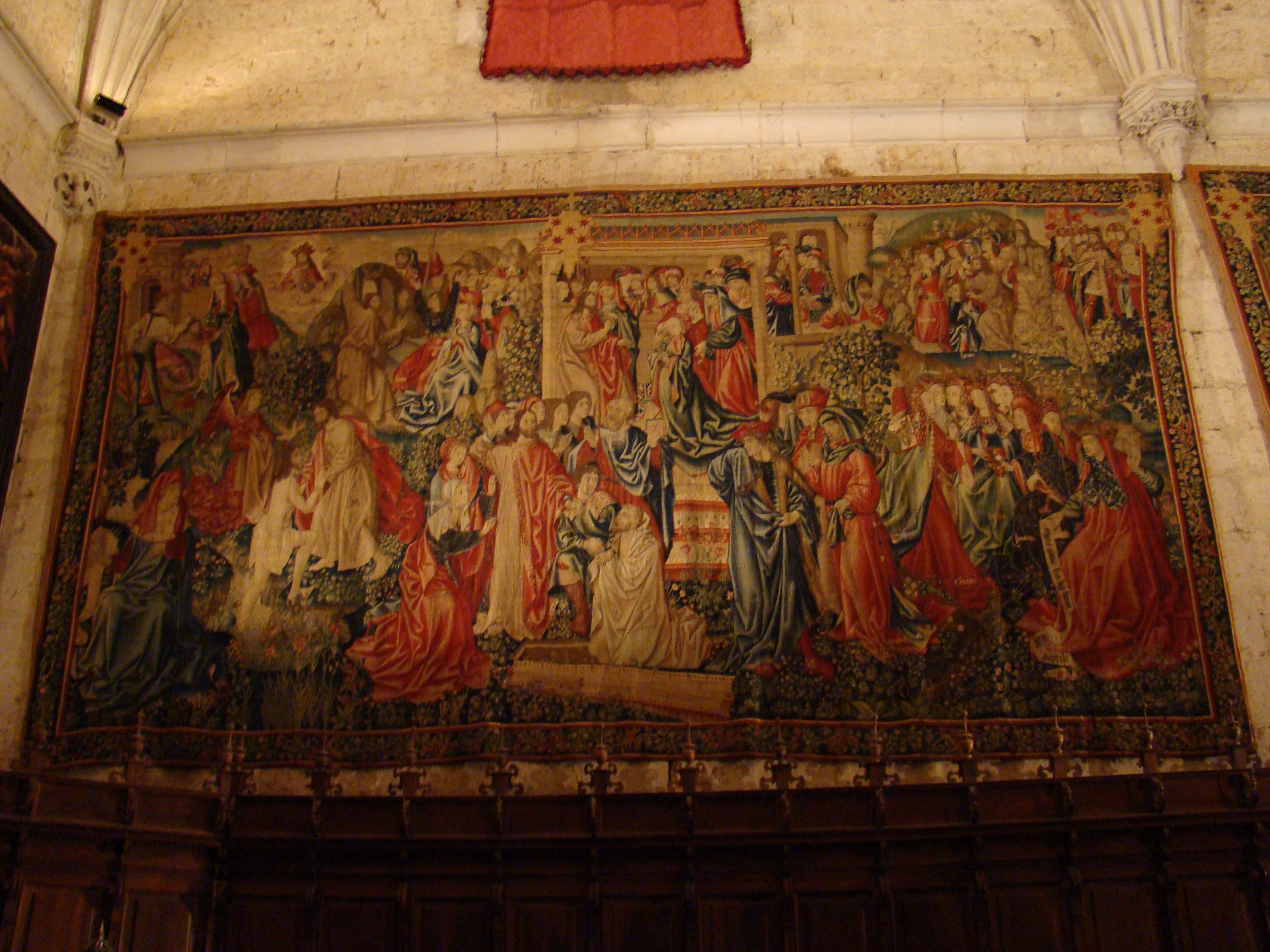 'Accingere gladio tvo super femur tvvm, potentissime'. Parte de una colección de tapices de la catedral de Palencia (España). Fueron adquiridos en los Talleres de Bruselas y en los de Marche-Crétif, que era el tapicero de Francisco I de Francia. on tres series bien diferenciadas que siguen ciclos narrativos distintos, cuyos donantes fueron el obispo Juan Rodríguez de Fonseca y el Dr. Arroyo, canónigo de Palencia y magistral de Valladolid. El tapiz se conserva en la Sala Capitular de la catedral de san Antolín de Palencia, provincia de Palencia, (España).